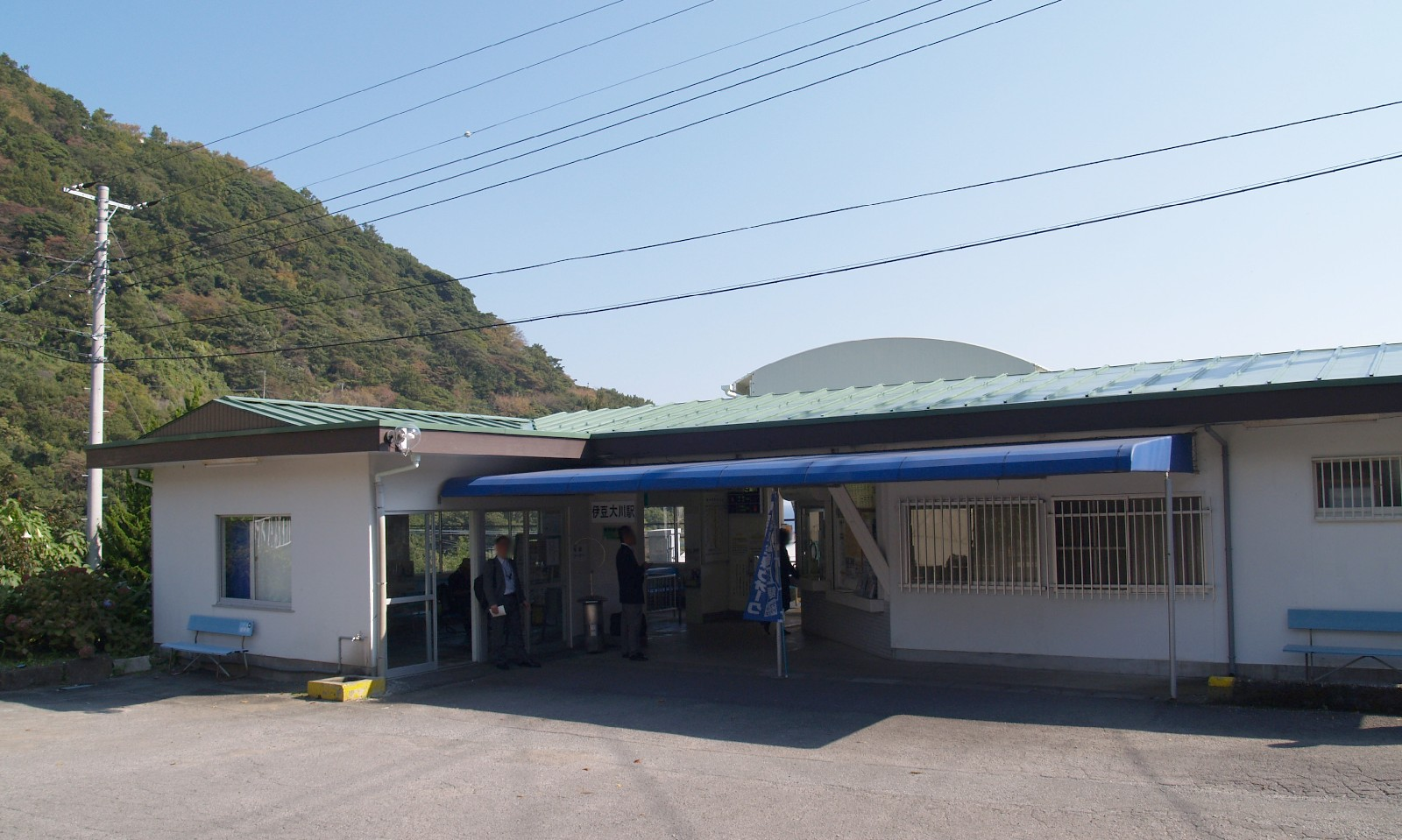 伊豆大川駅